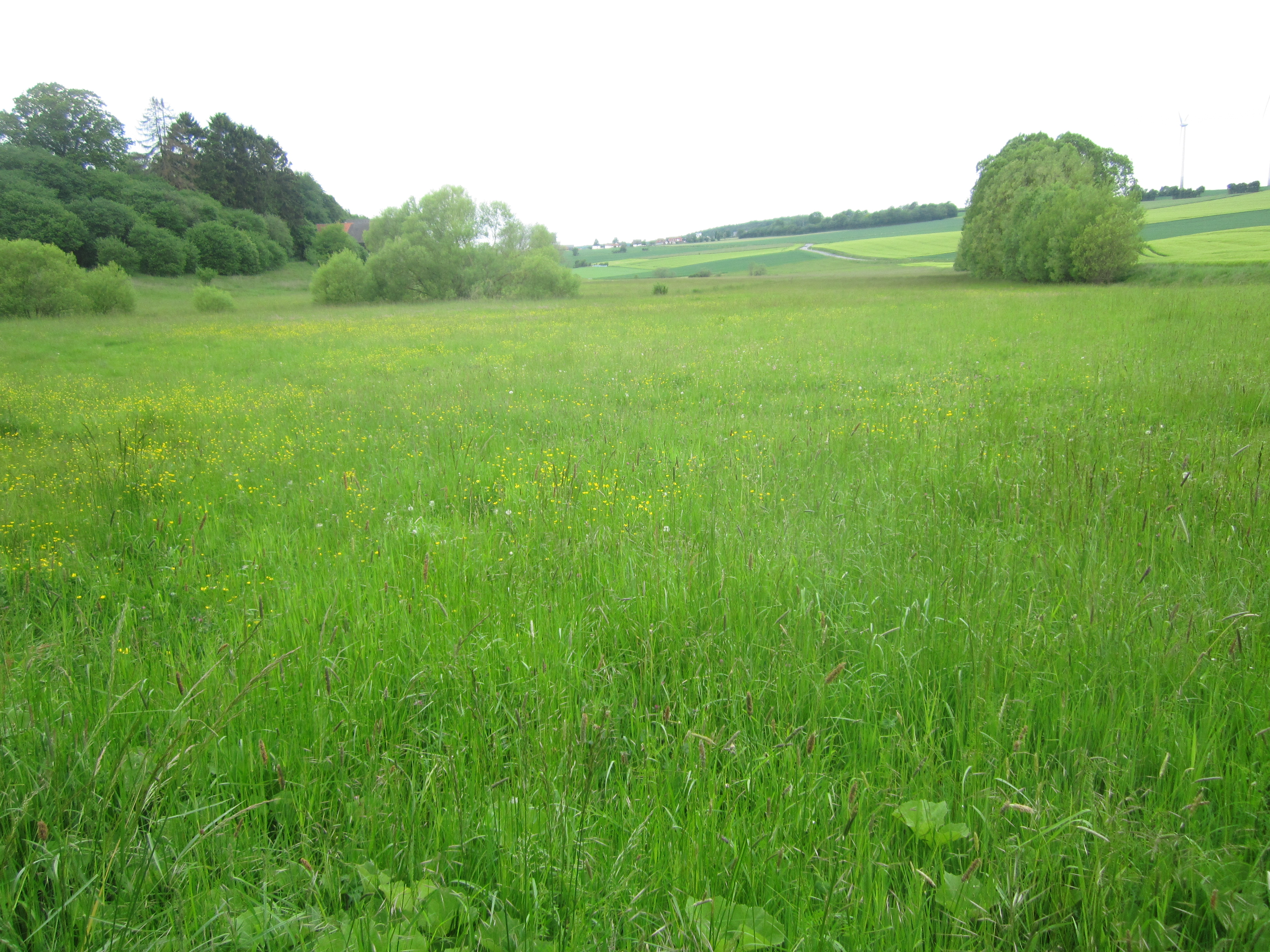 Naturschutzgebiet Bremer Bachaue (Blick nach Westen von Höhe Kläranlage Bremen).